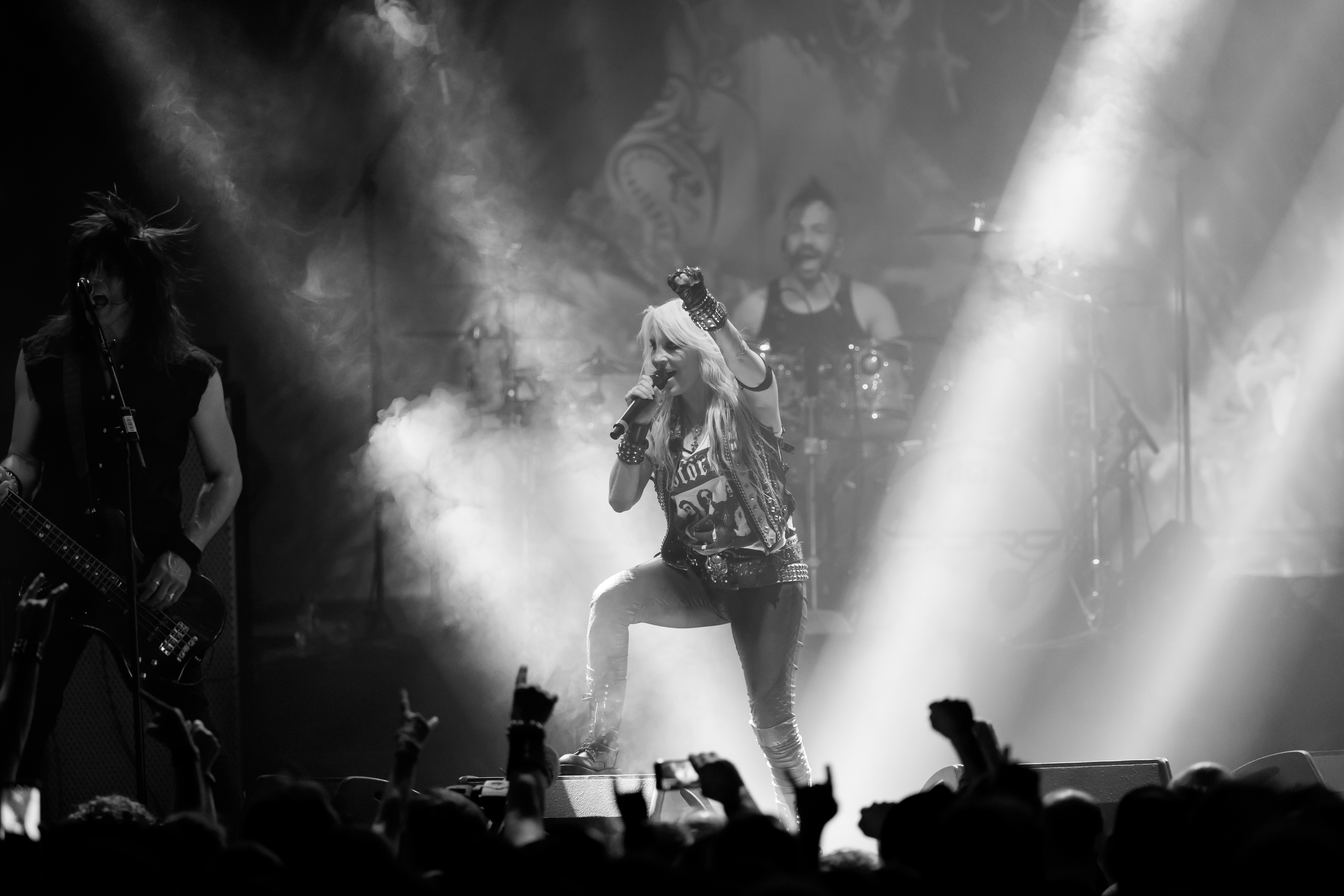 Doro during Zeltfestival Rhein-Neckar at Maimarkt, Mannheim, Baden-Württemberg, Germany on 2017-06-24, Photo: Sven Mandel